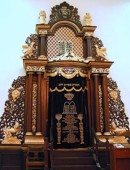 Синагога на Подолі вул. Щекавицька, 29 в Киеве